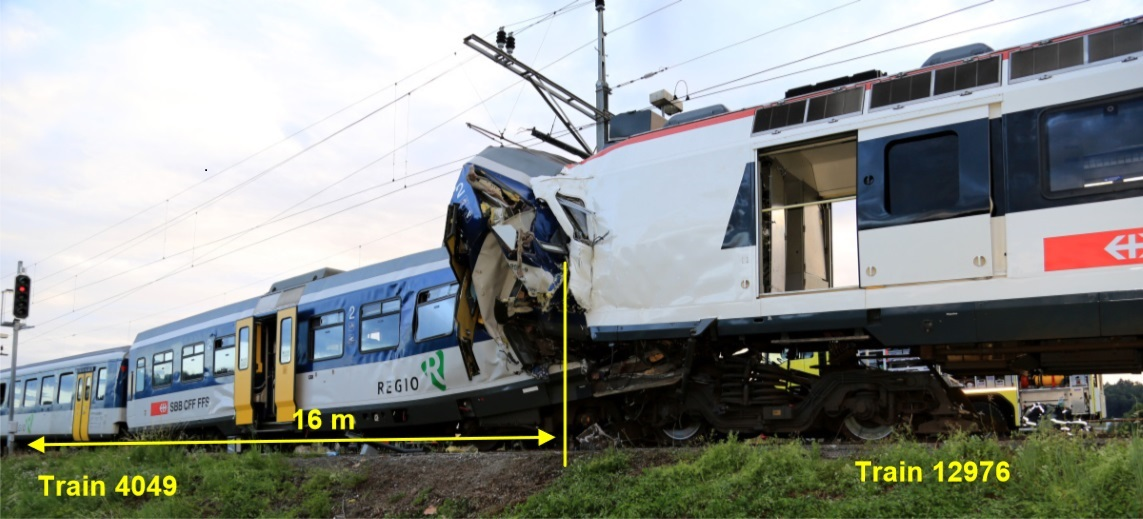 Am Mittwoch, 29. Juli 2013 um 18.44 Uhr, kollidierten der Regionalzug 12976 Payerne – Lausanne und der Regio-Express Zug 4049 Lausanne – Payerne um Bahnhof Granges-Marnand VD.